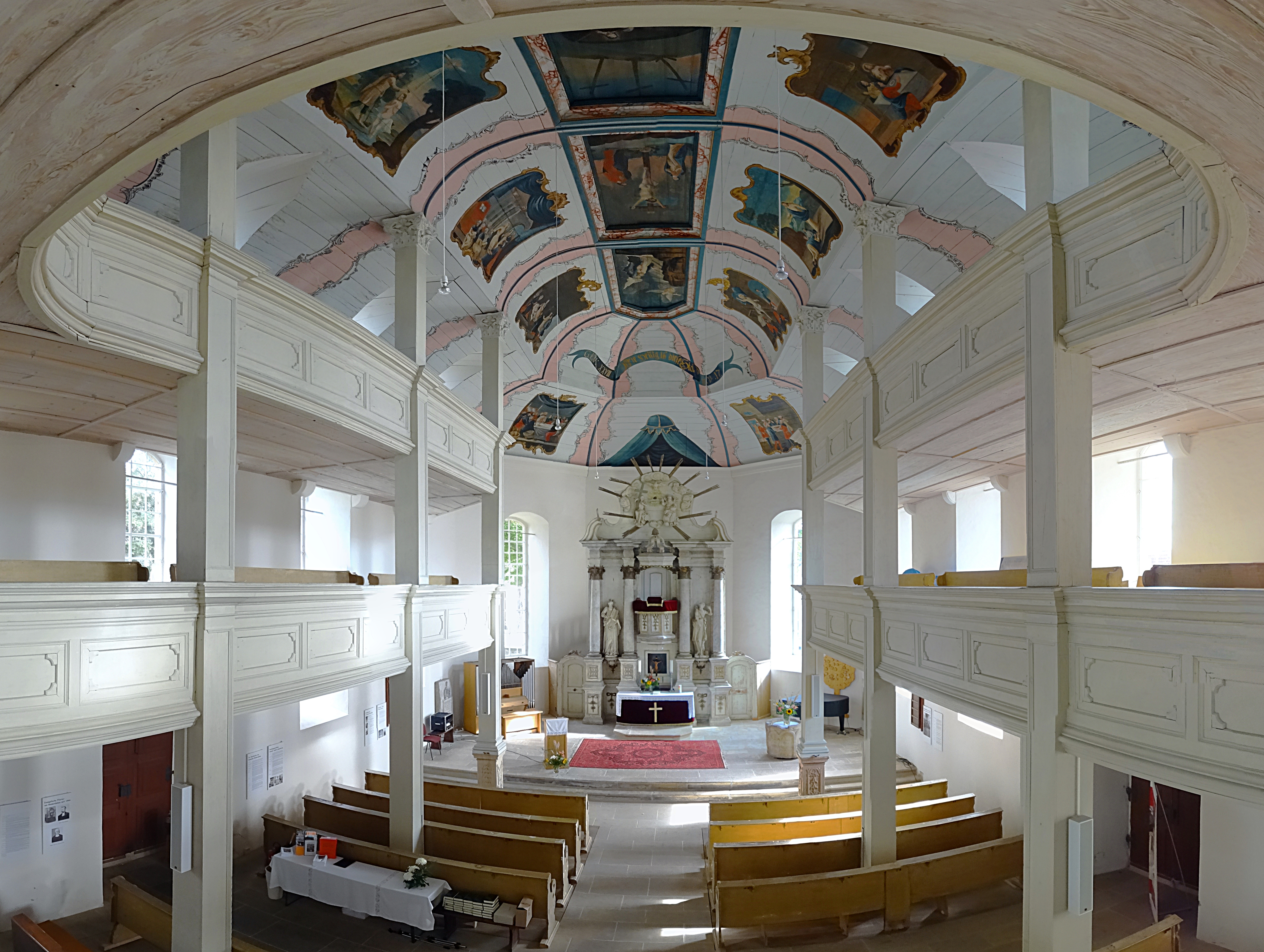 Innenraum-Panorama St. Lukas (Bindersleben)